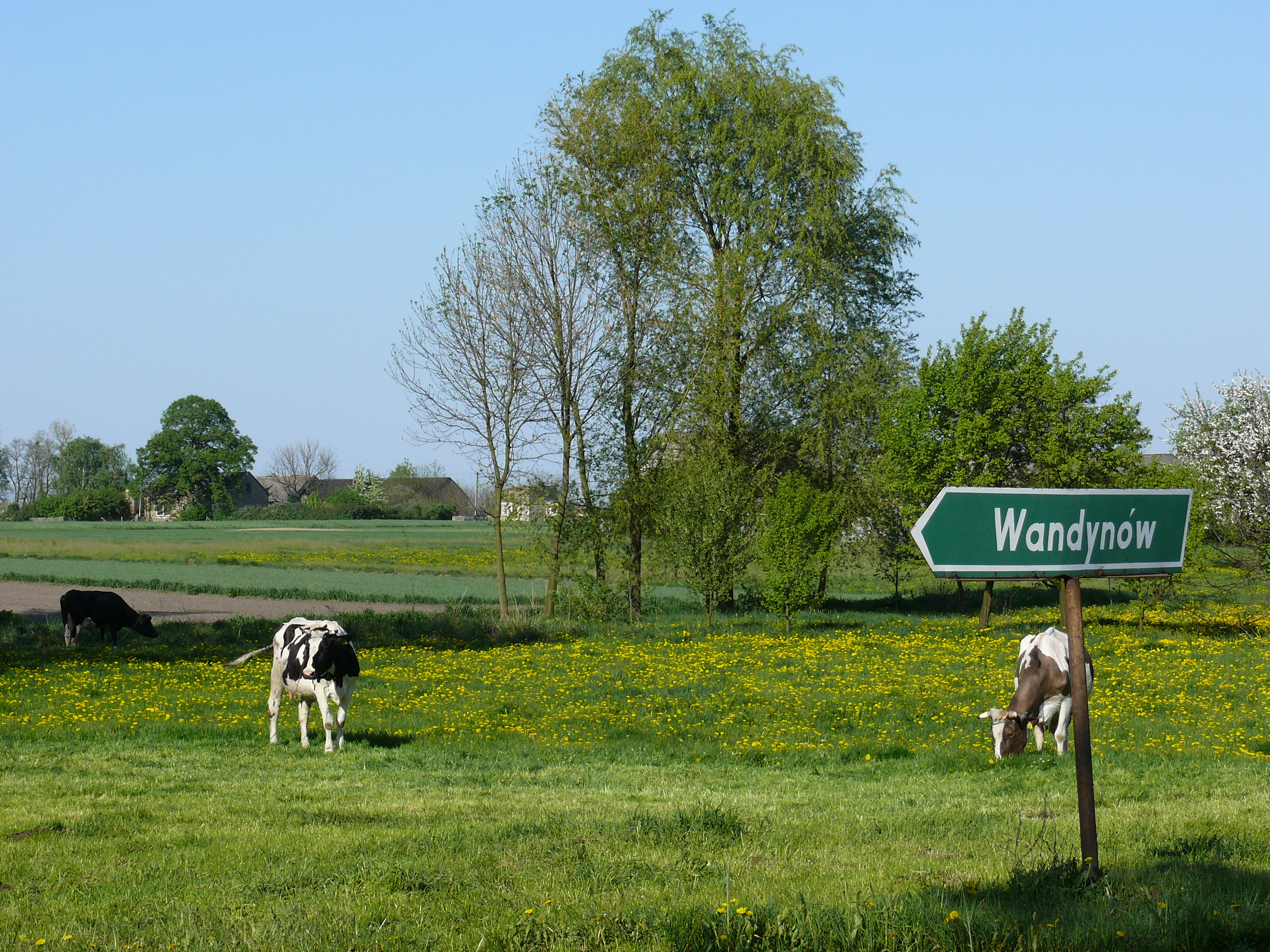 Okolice wsi Wandynów (gmina Koło)